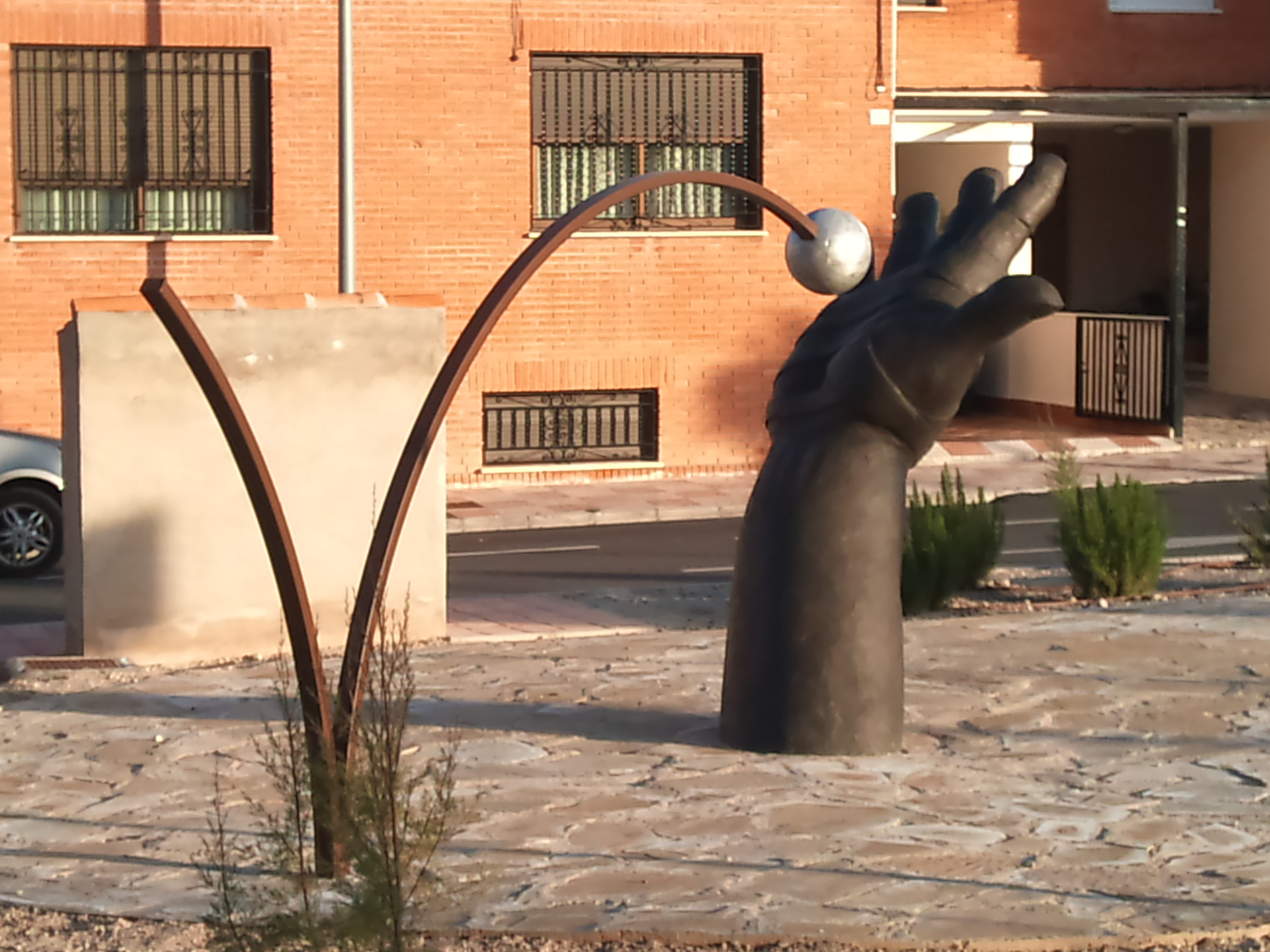 Monument a la Pilota Valenciana a Castalla, Alcoià.